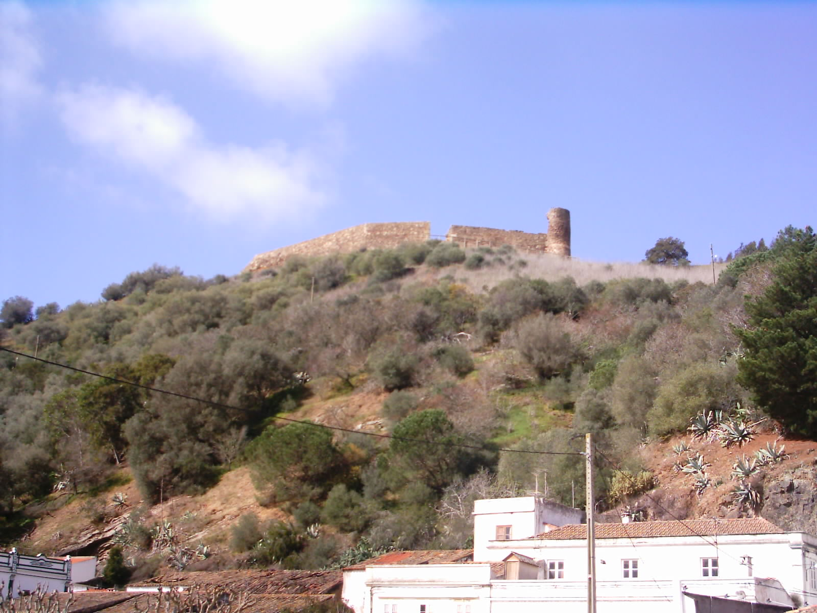 Castelo de Aljezur, Aljezur, Portugal.